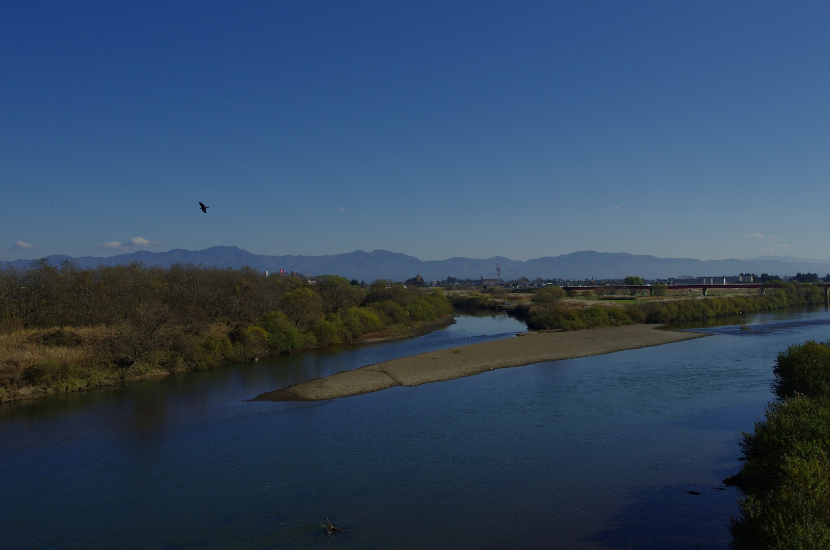 大曲南大橋より雄物川上流方向を望む